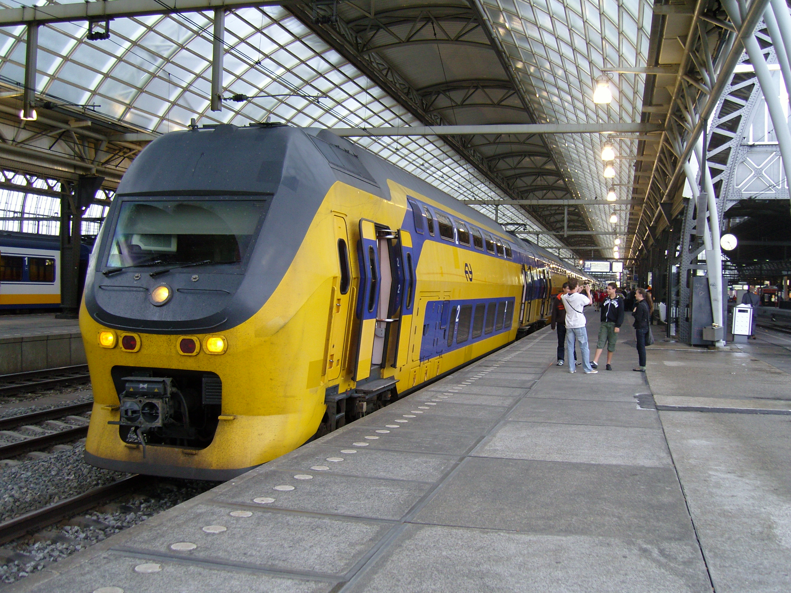 2 V-IRM stammen op station Amsterdam Centraal onderweg als intercity naar Schagen.